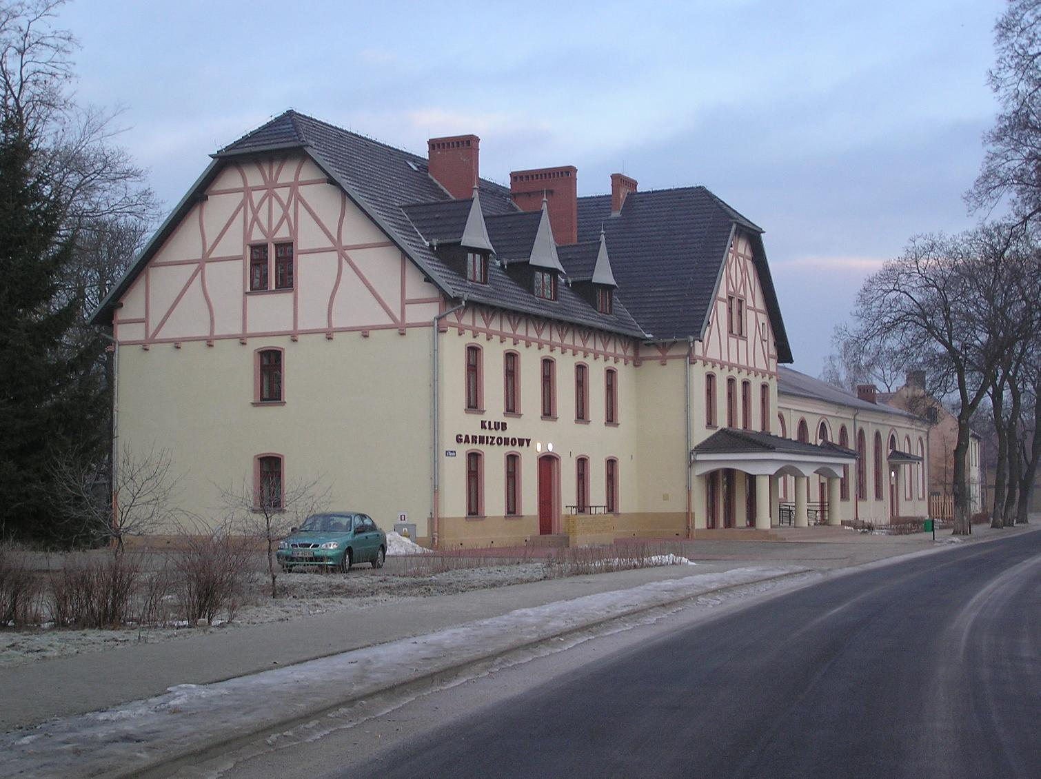 Świętoszów - Klub garnizonowy, dawny hotel "Kaiser-Hof" wzniesiony w 1915 r.